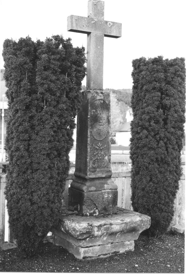 croix du Jubilé en grès jaune - photo N&B - passage SNCF, route de Rambervillers (88) à Raon-L'Étape 88372